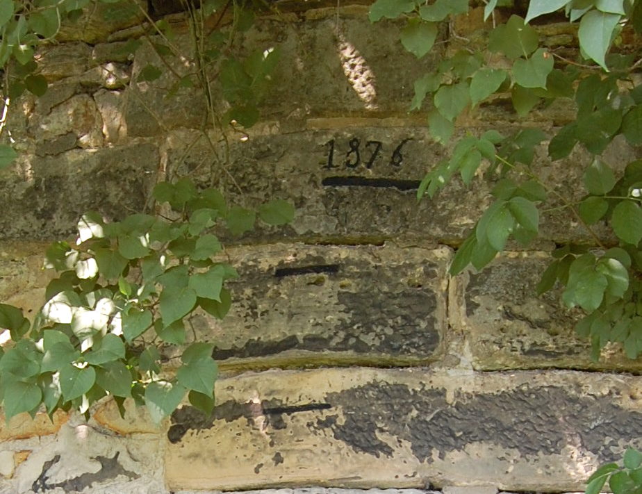 auf den Hochwasserstand der Elbe von 1876 verweisende Hochwassermarke in Magdeburg-Westerhüsen